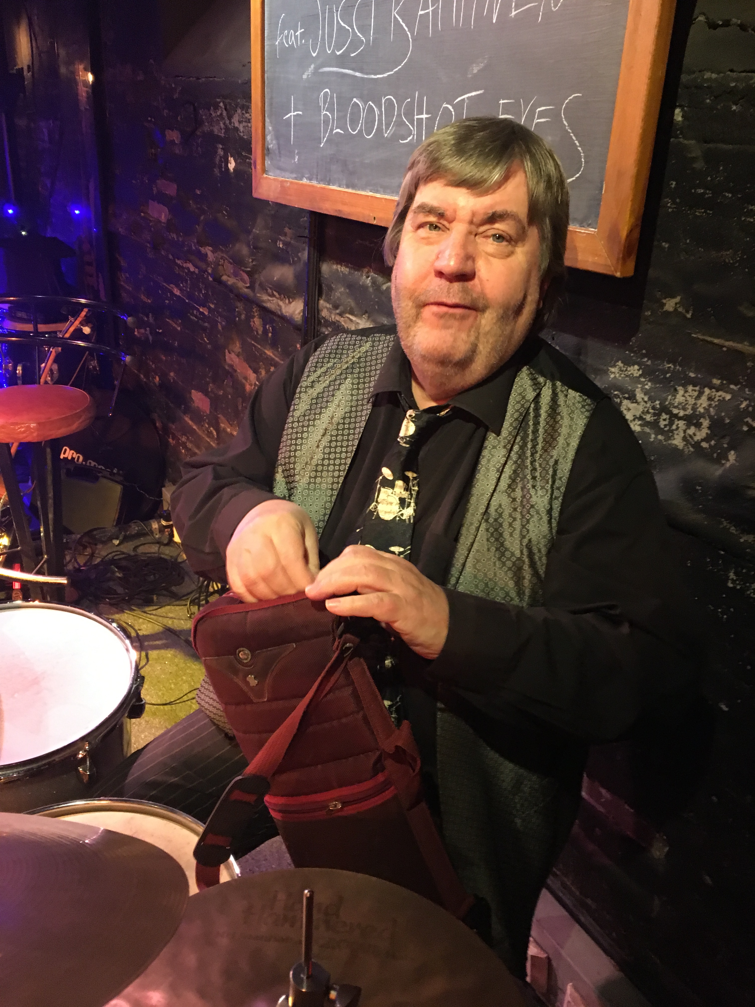 Mikko Virto Storyvillen lavalla Helsingissä 2018